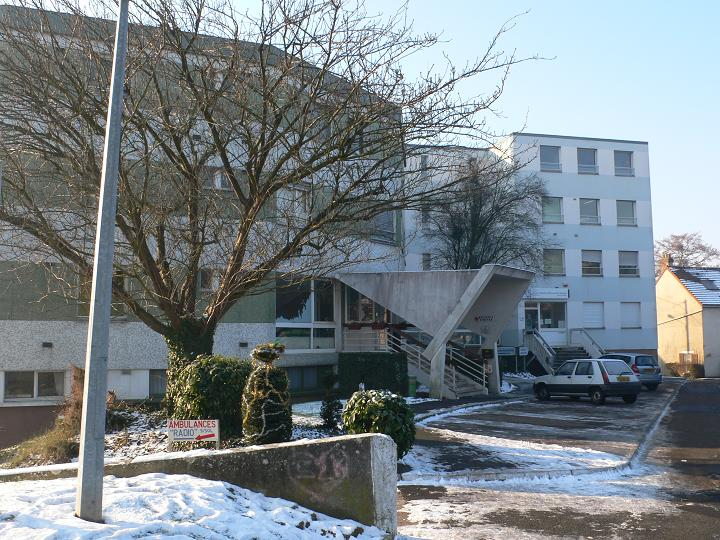 Brétigny-sur-Orge : Clinique LaFontaine